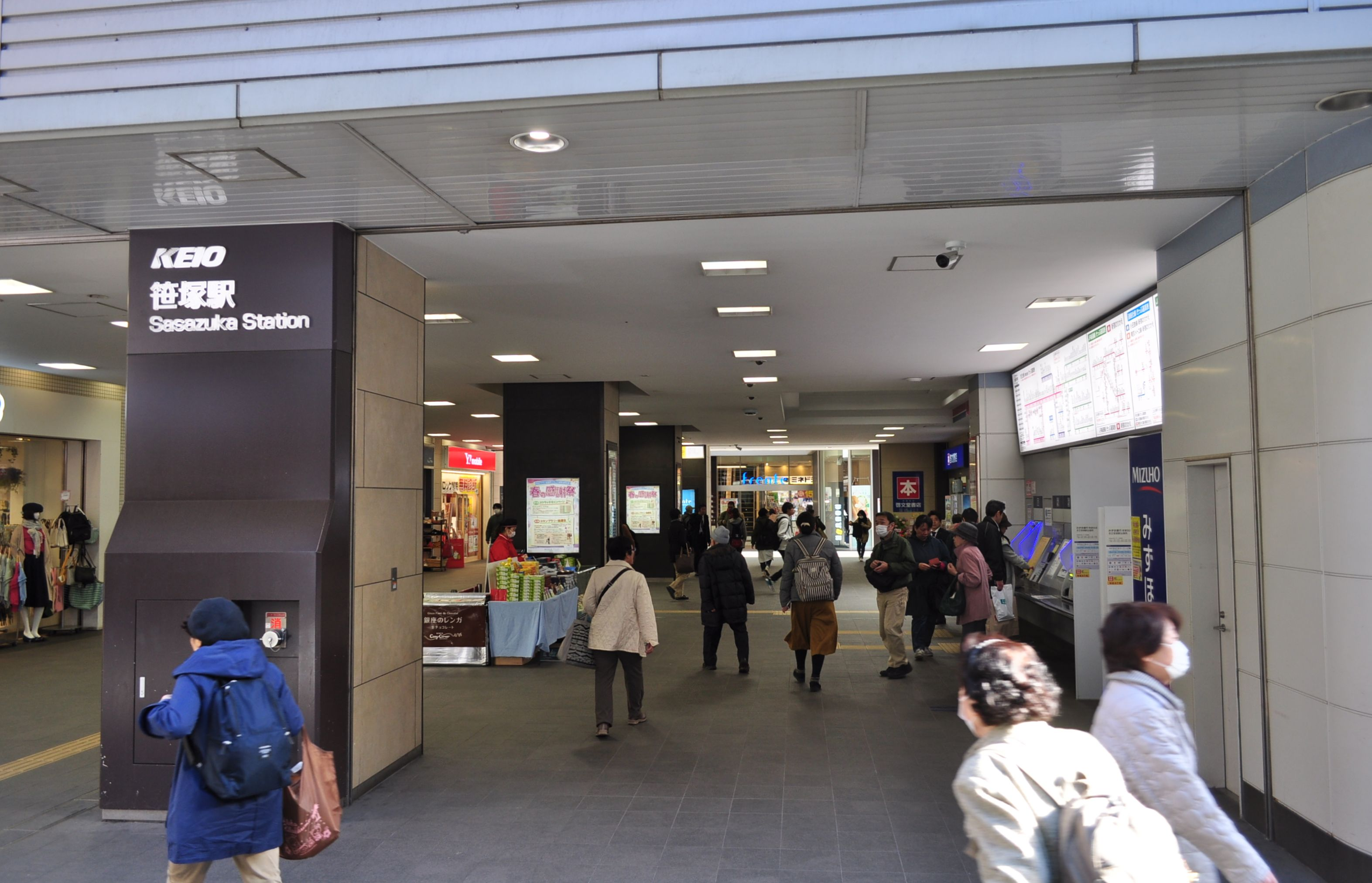 都営新宿線・京王線・京王新線 笹塚駅 Nikon D5000